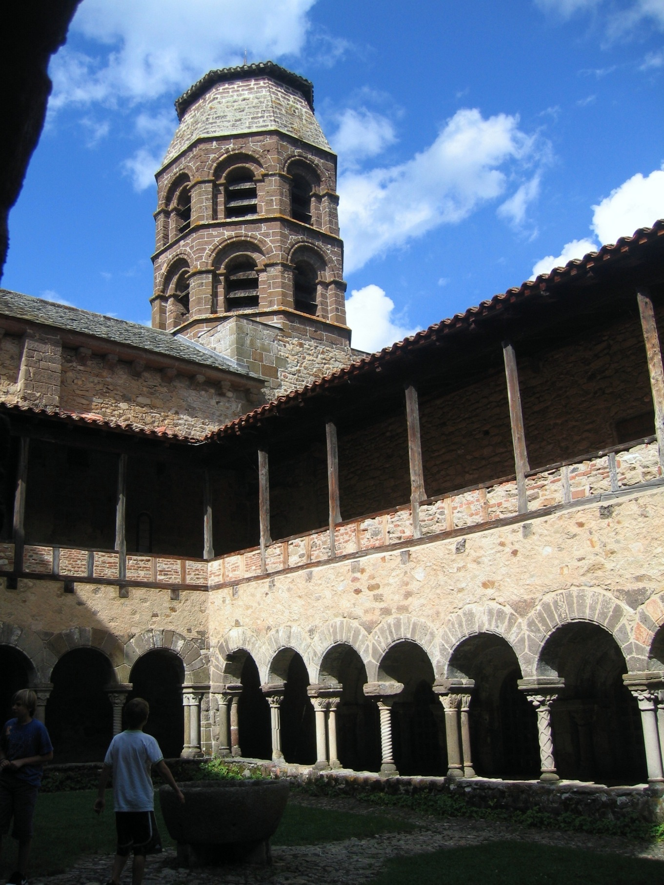 Auvergne Lavaudieu Abbaye Cloitre